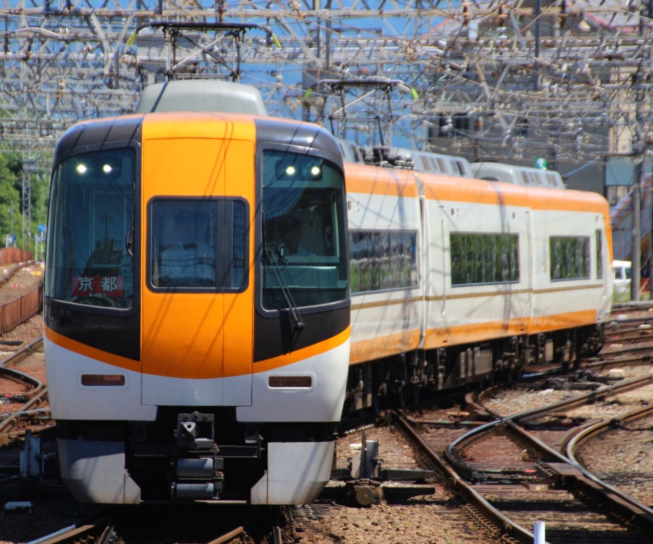 近鉄22000系AL10 大和西大寺駅